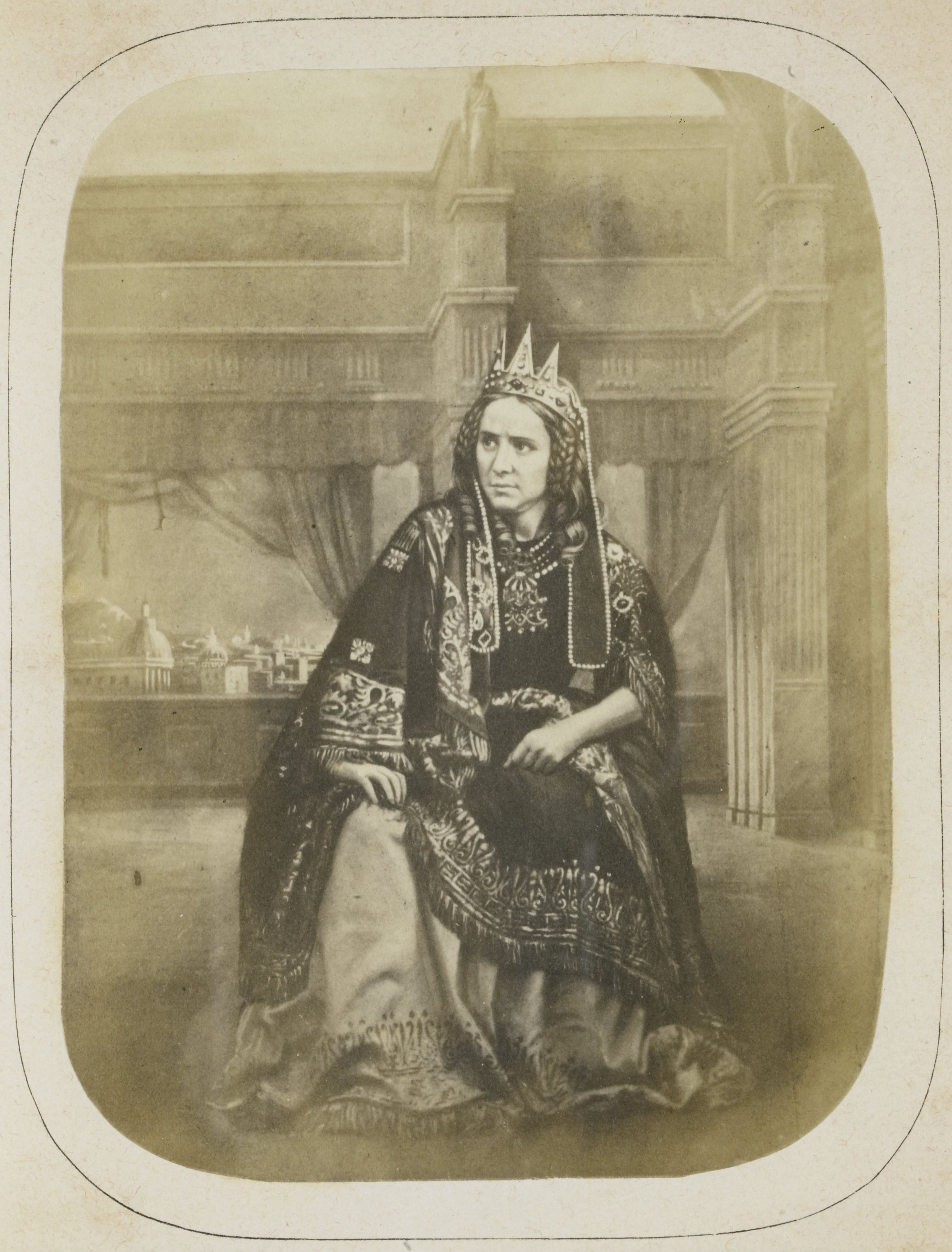 IdentificatieTitel(s): Fotoreproductie schilderij Rachel in de rol van Athalie in Athalie, acte II, scene VIIObjecttype: foto Objectnummer: RP-F-F25550-HVervaardigingVervaardiger: fotograaf: Henri de La BlanchèreDatering: ca. 1850 - ca. 1859Fysieke kenmerken: albuminedrukTechniek: albuminedrukVerwerving en rechtenVerwerving: overdracht van beheer 1994Copyright: Publiek domein